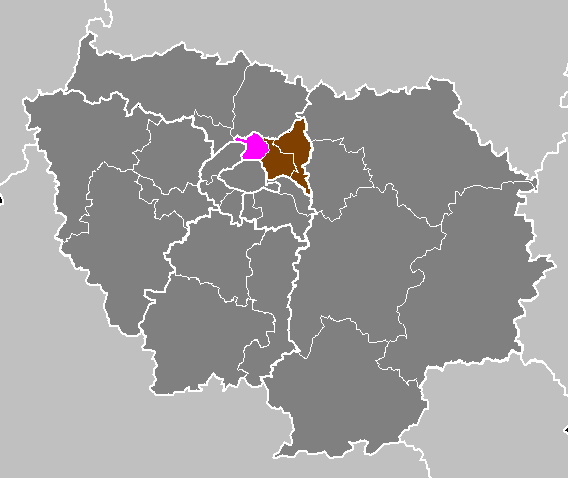 Maps of arrondissements and cantons of France: Département de la Seine-Saint-Denis - Arrondissement de Saint-Denis.PNG (Région Île-de-France)